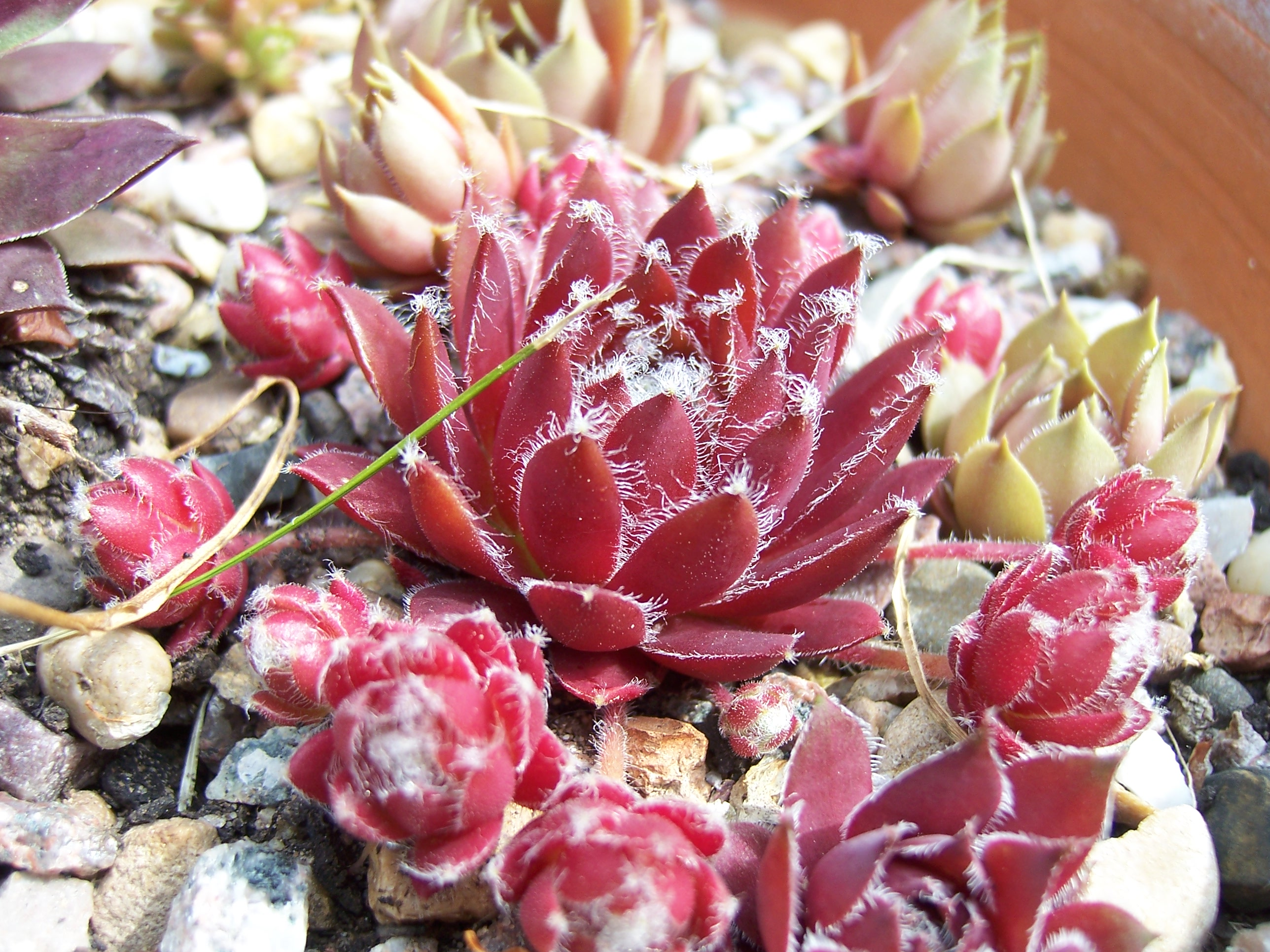 Sempervivum